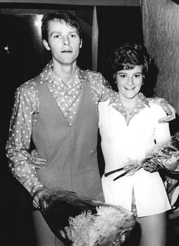 Hilary Green, Glyn Wats Zentralbild Thieme 11.10.69 Karl-Marx-Stadt: Internationales Schaulaufen zum Saisonauftakt im Eiskunstlauf am 10.10.69 in der Karl-Marx-Städter Eissporthalle VIII. Parlament. Zu den gefeierten internationalen Gästen zählte auch das Tanzpaar Hilary Green-Glyn Wats (Großbritannien).